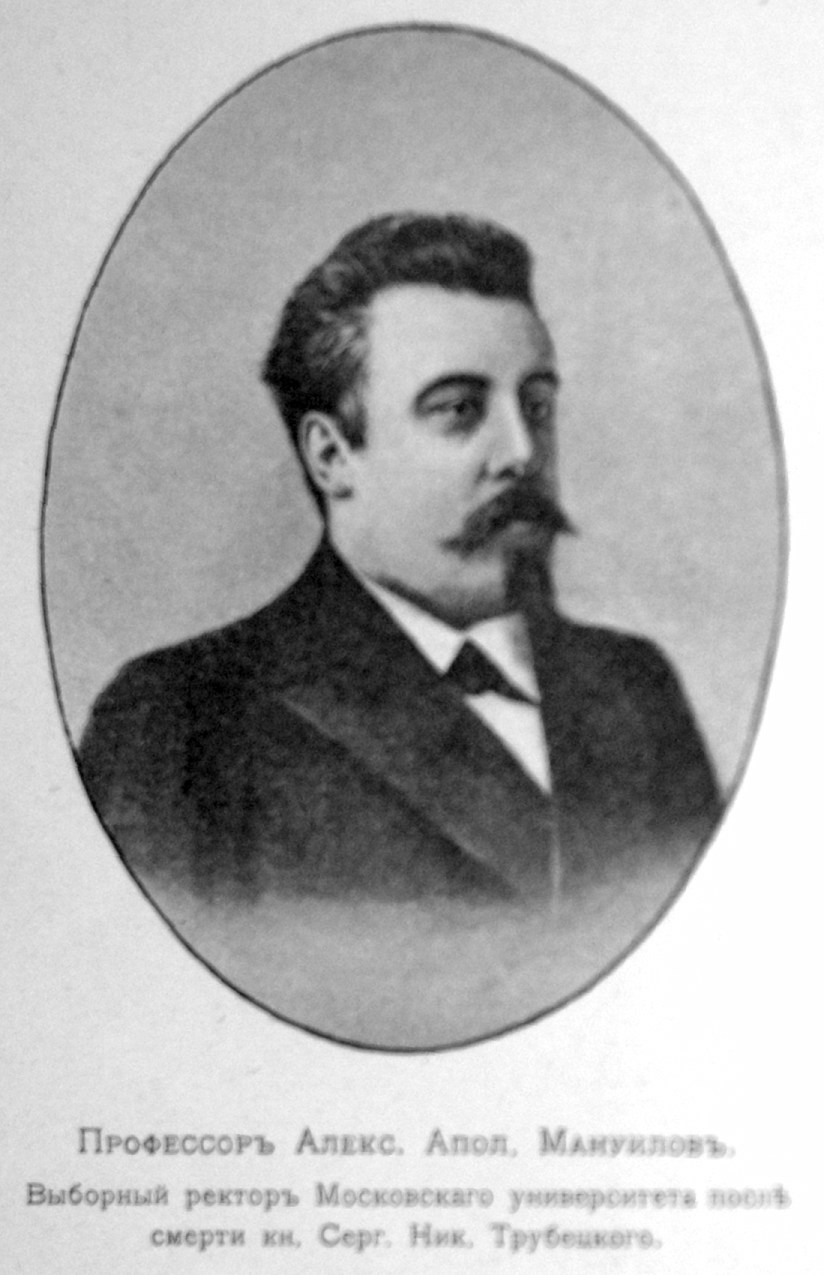 Алекса́ндр Аполло́нович Ману́йлов (Мануилов; 22 марта (3 апреля) 1861, Одесса — 20 июля 1929, Москва) — российский экономист, министр народного просвещения Временного правительства (1917).